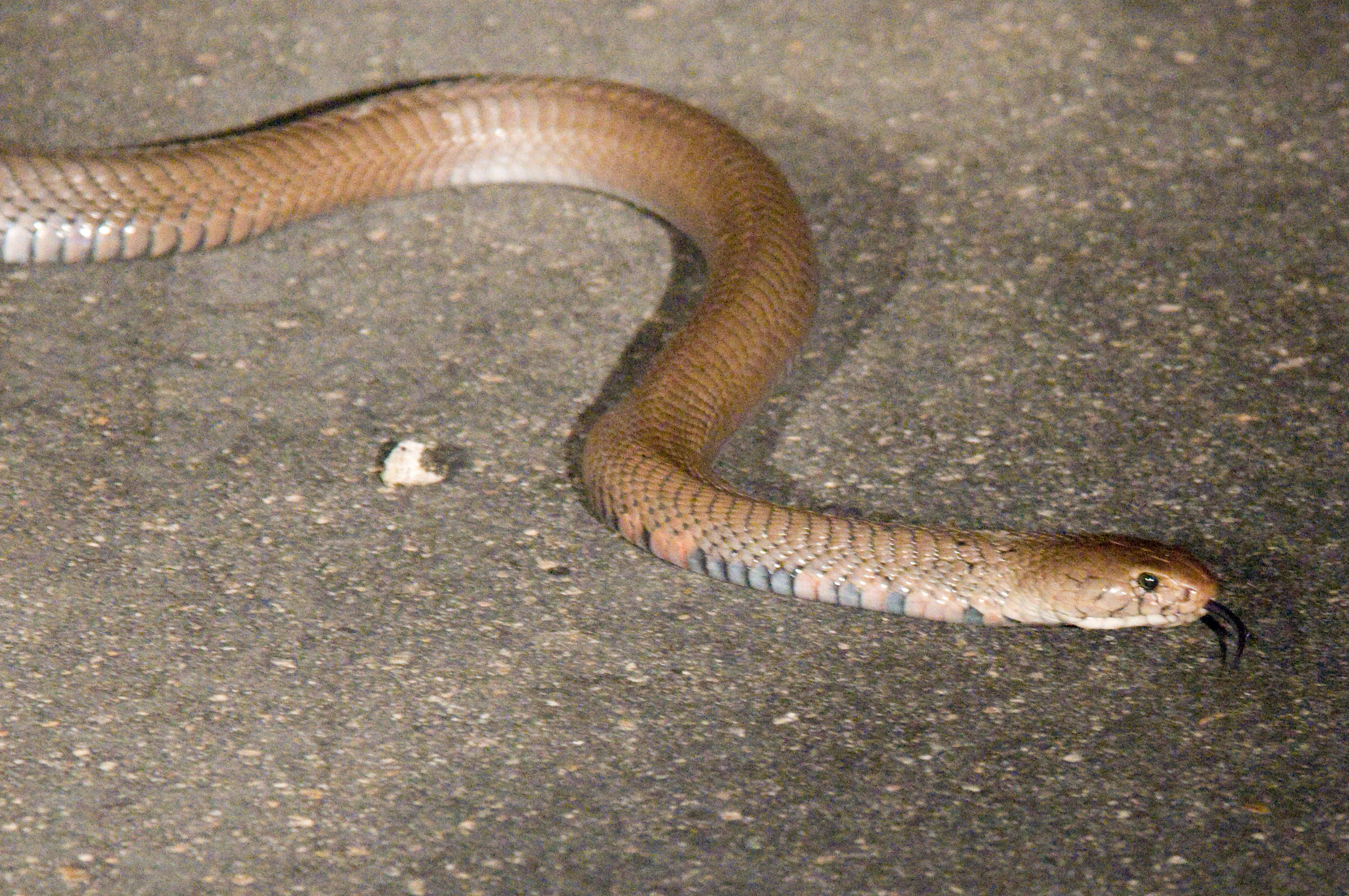 Mozambique Spitting Cobra (Naja mossambica) Dysmorodrepanis 01:09, 29 May 2008 (UTC)